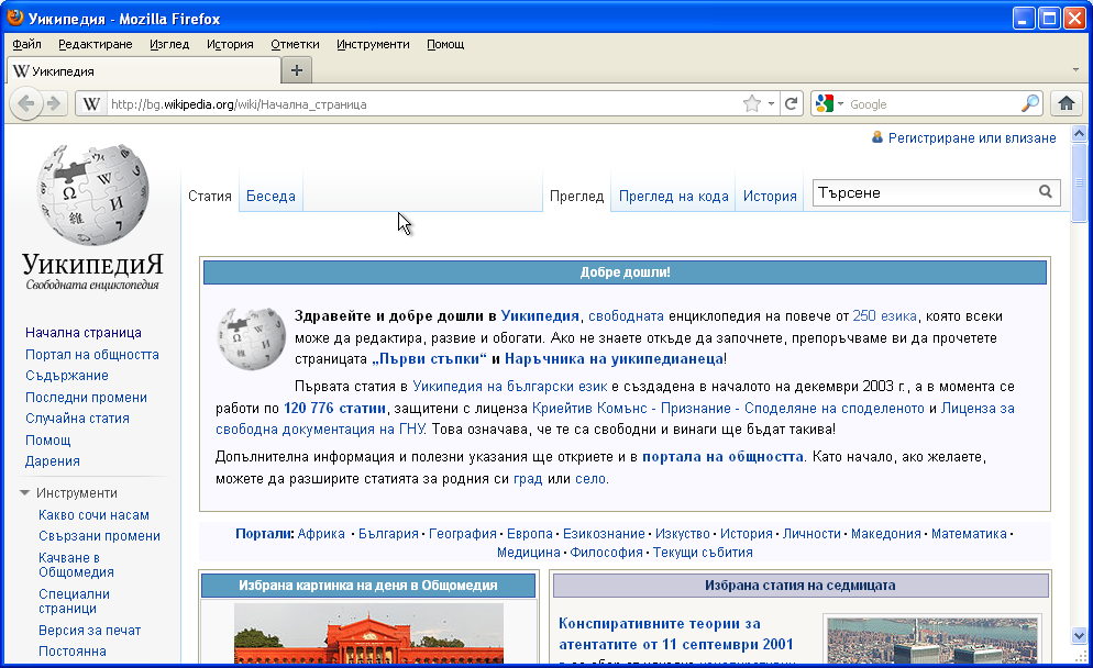 Firefox 6.02 показва началната страница на Уикипедия